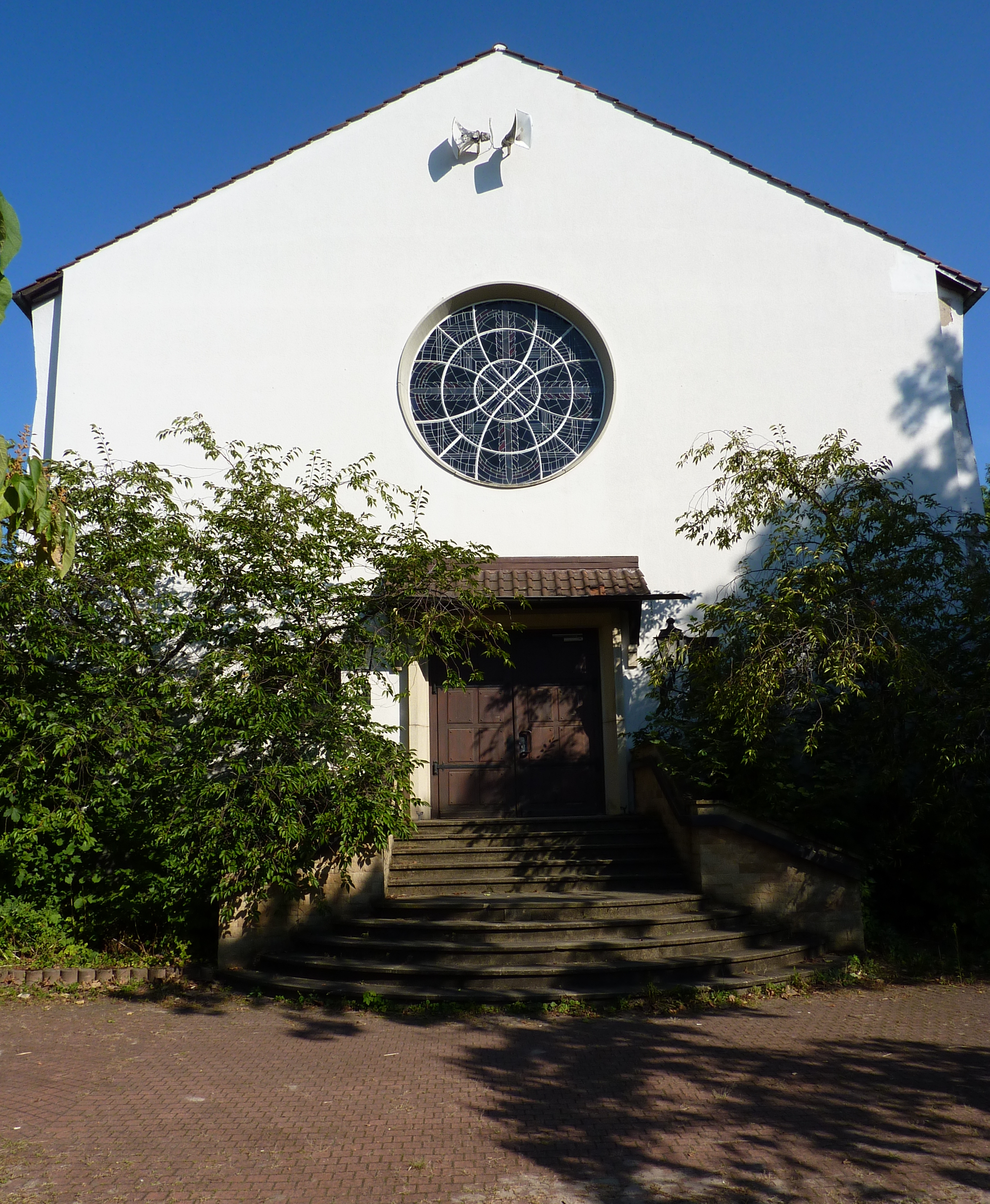 Chapel aus Blickrichtung Westen nach Osten